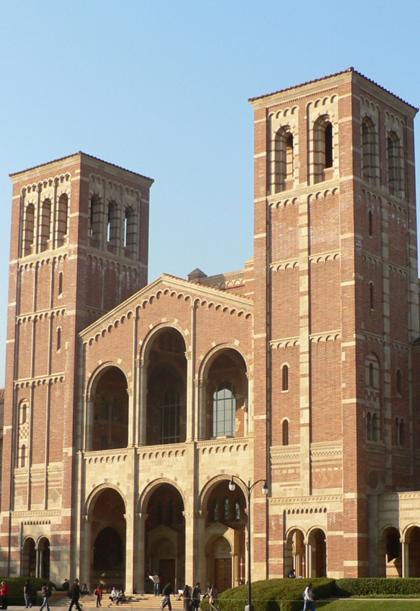 Royce facade, cropped